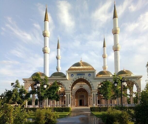 Центральная мечеть в селе Ачхой Мартан